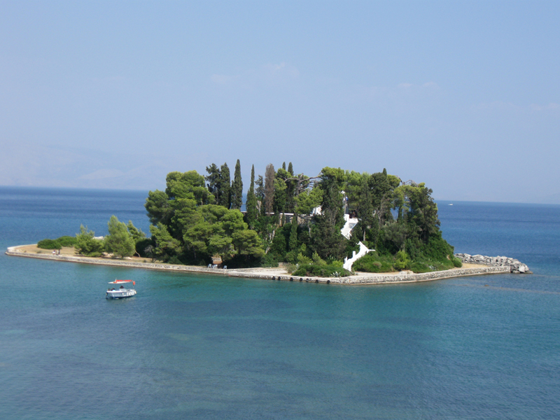 Аутор: Корисник:SmirnofLeary, август 2009. године. Мишије острво (један од заштитних знакова Крфа), на источној страни острва Крф, позната по цркви на острву.